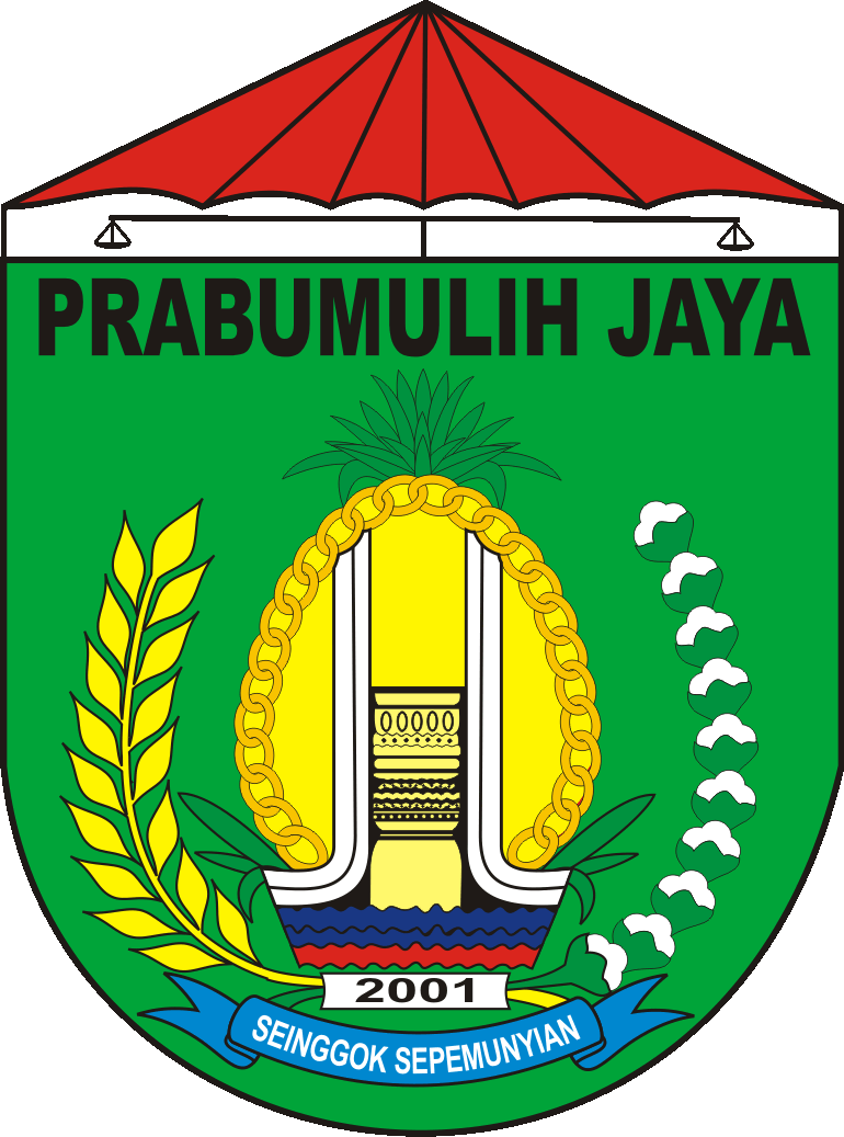 Lambang Kota Prabumulih